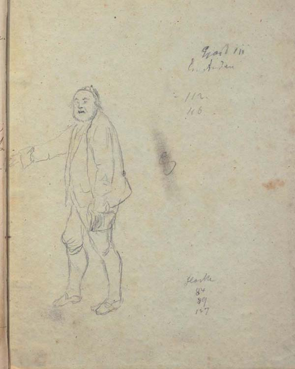 Bent i Gildet paa Solhoug